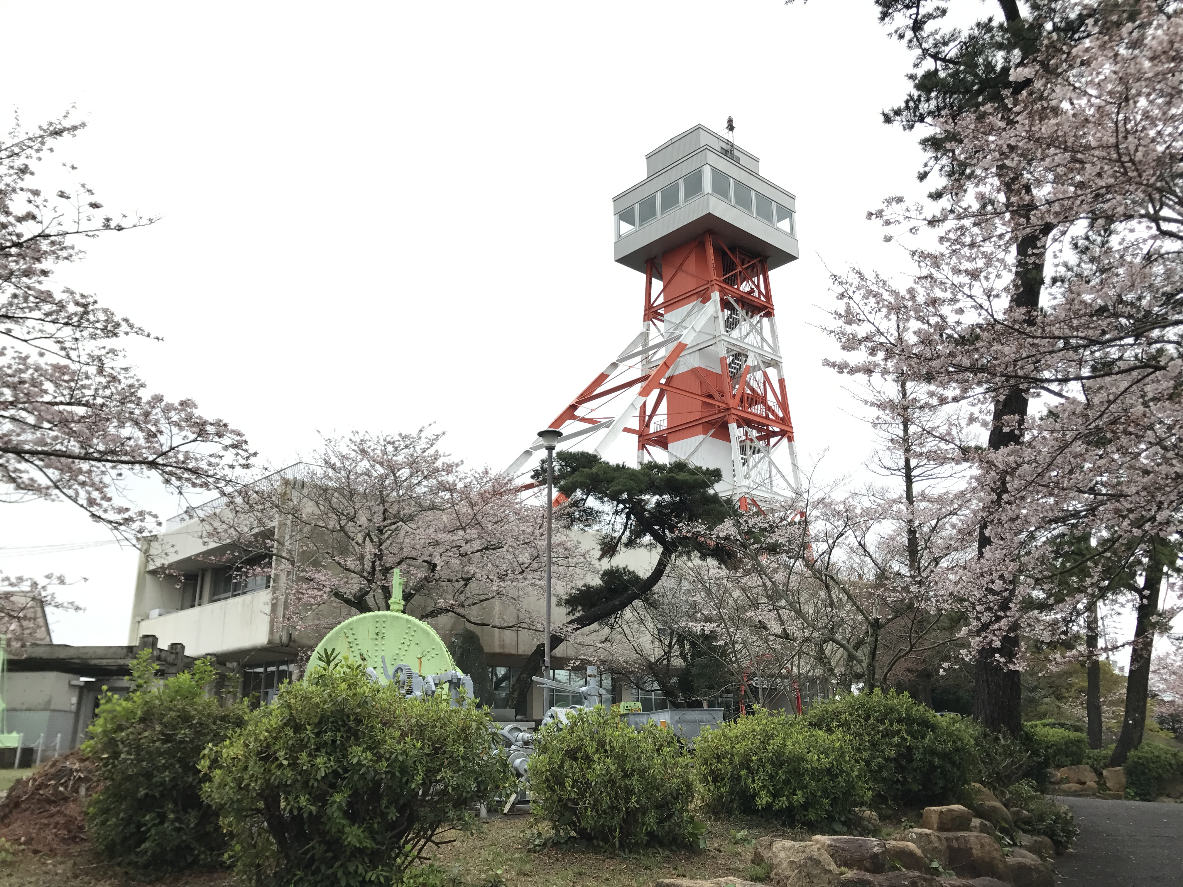 常盤公園の石炭記念館